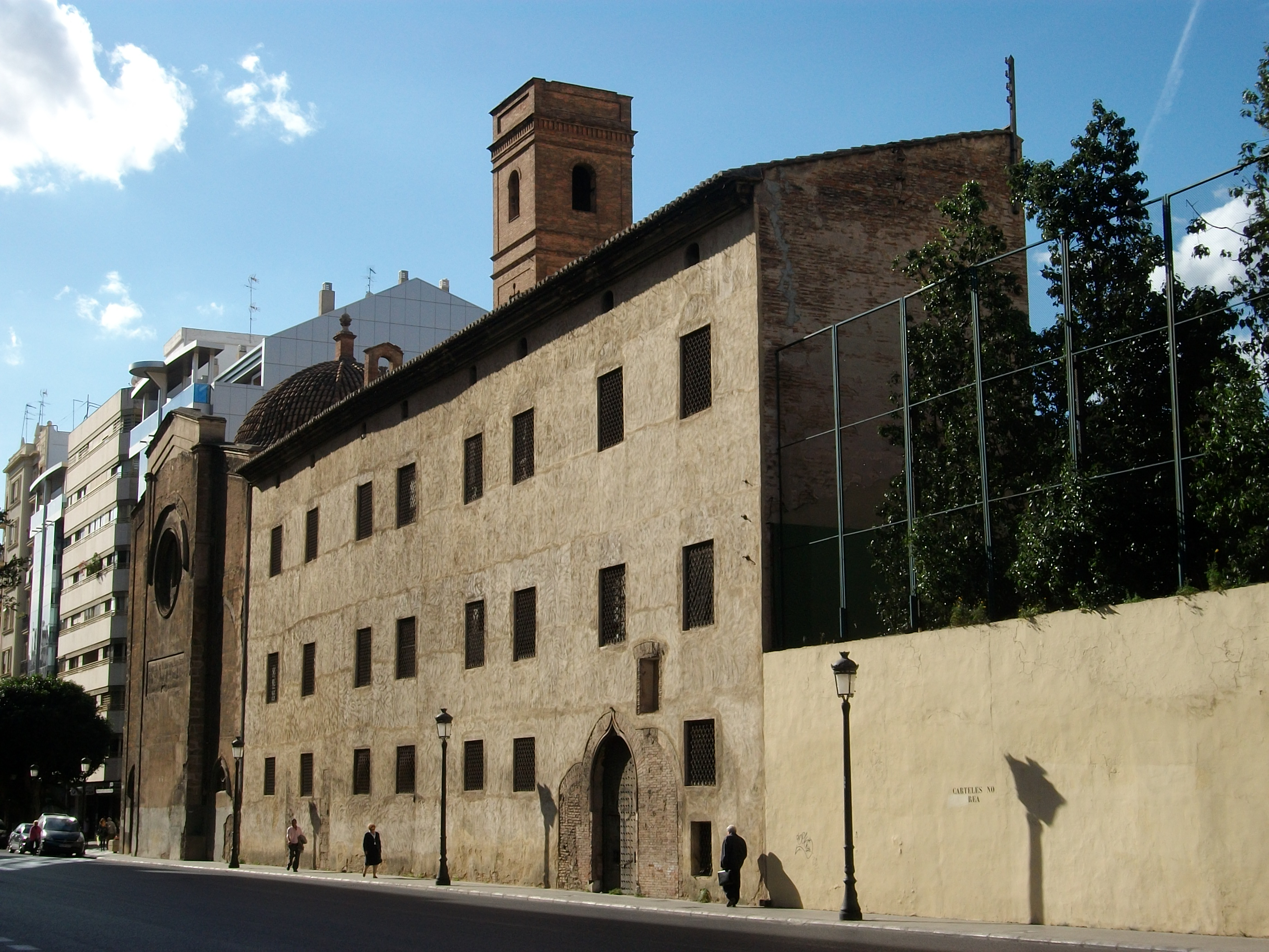 Exterior de Sant Vicent de la Roqueta, carrer Sant Vicent, València, l'Horta, País Valencià.